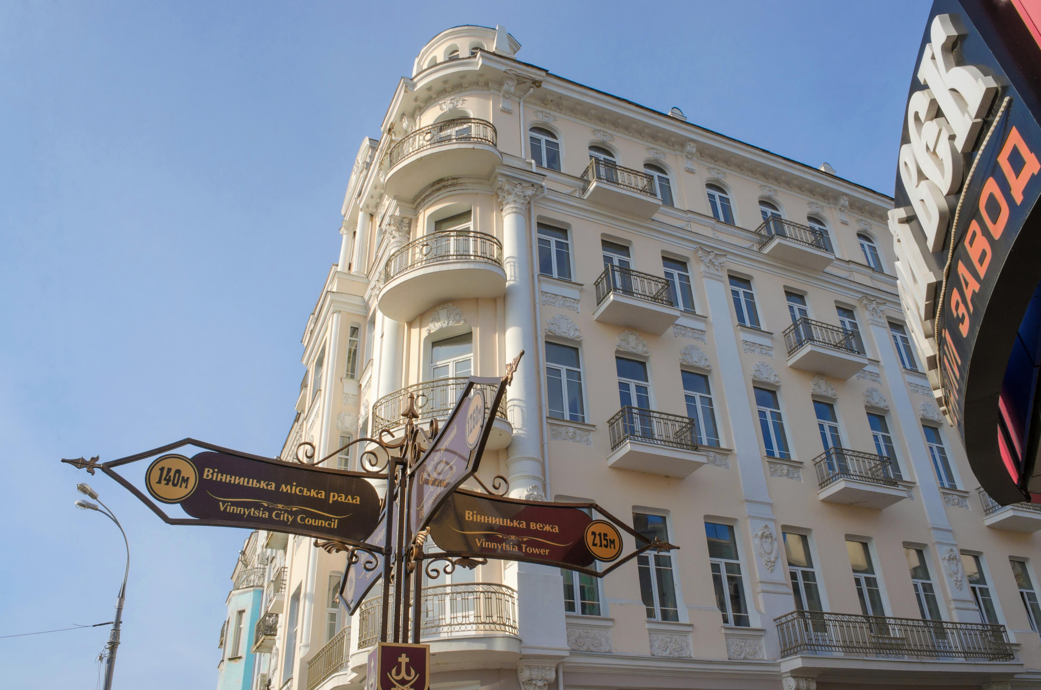 Готель «Савой», Вінниця, вул. Козицького, 36